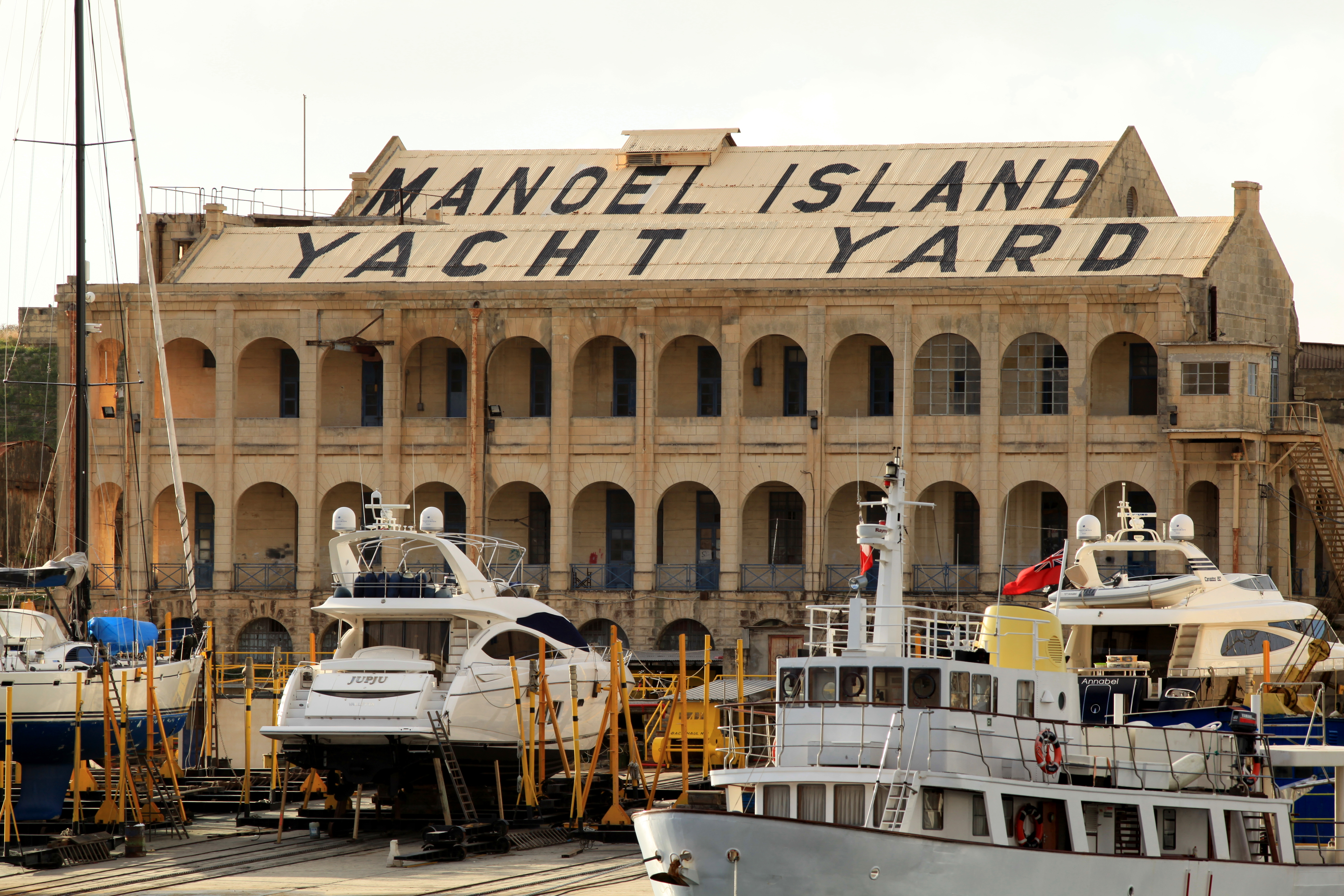 View from Triq Ix-Xatt in Sliema to the Manoel Island Yacht Yard in Gżira, Malta